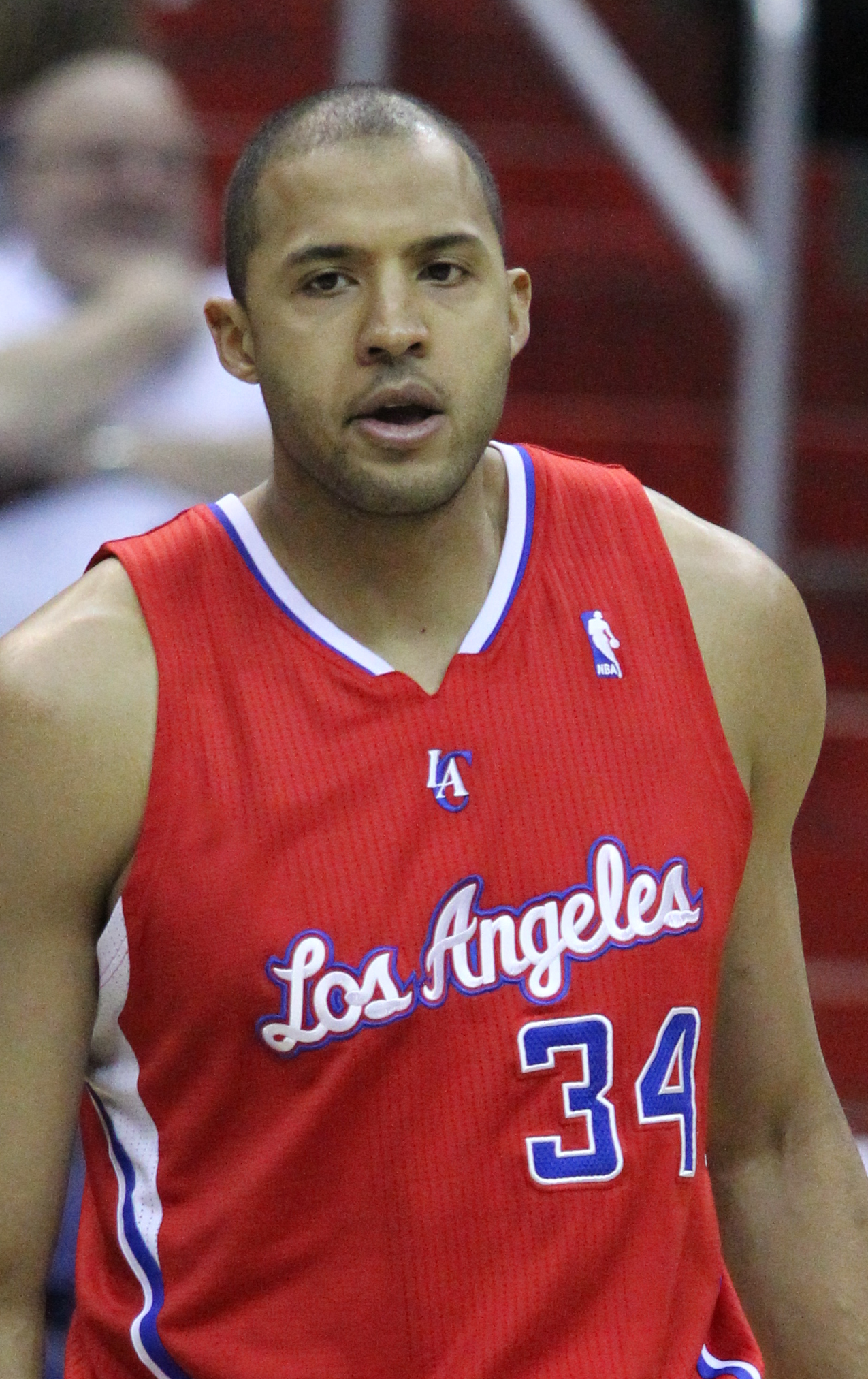 Wizards v/s Clippers 03/12/11